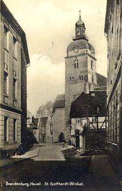 St. Gotthardt mit ältestem Schulhaus